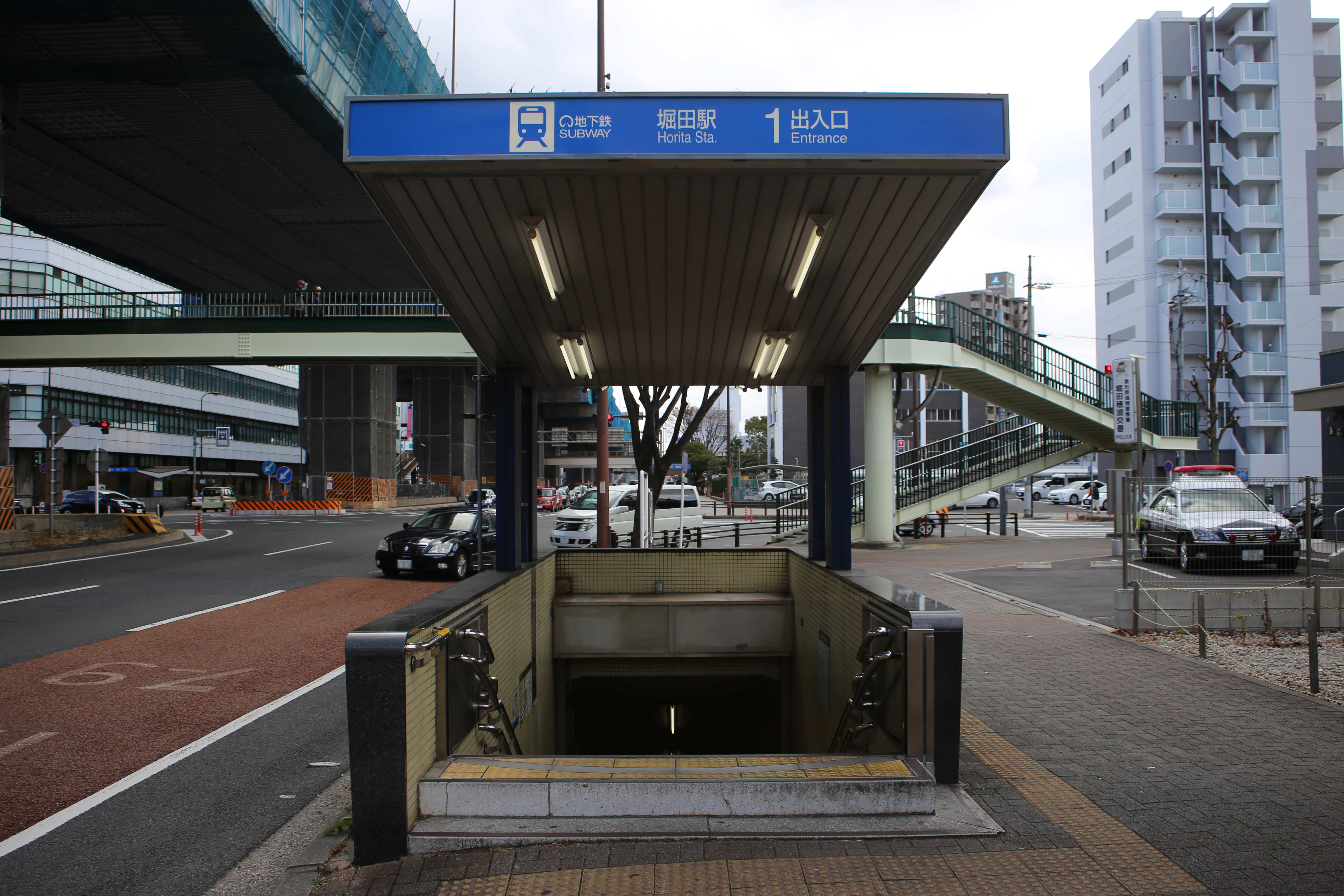 名古屋市瑞穂区苗代町の名古屋市営地下鉄名城線堀田駅1番出入口